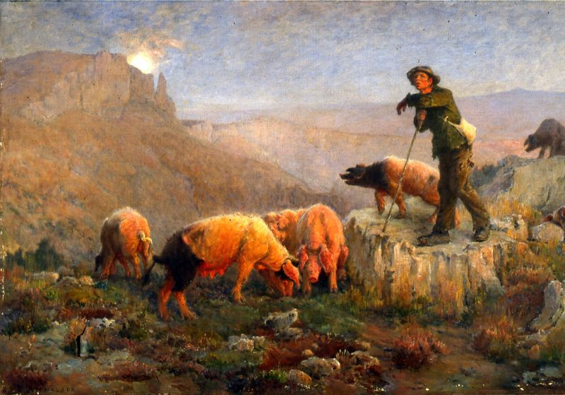 L'enfant prodigue gardant les pors par Paul Vayson